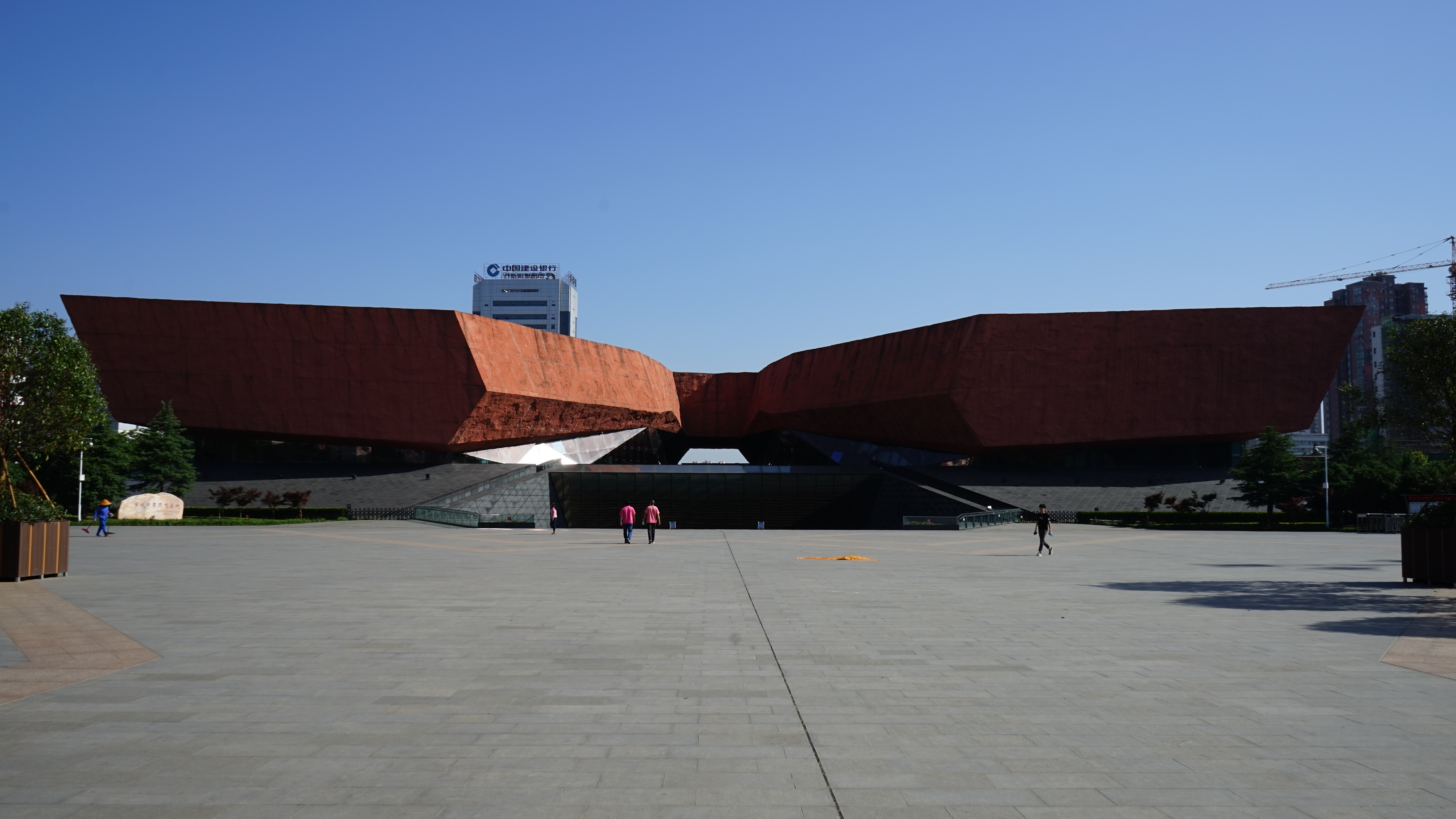 辛亥革命博物馆外观